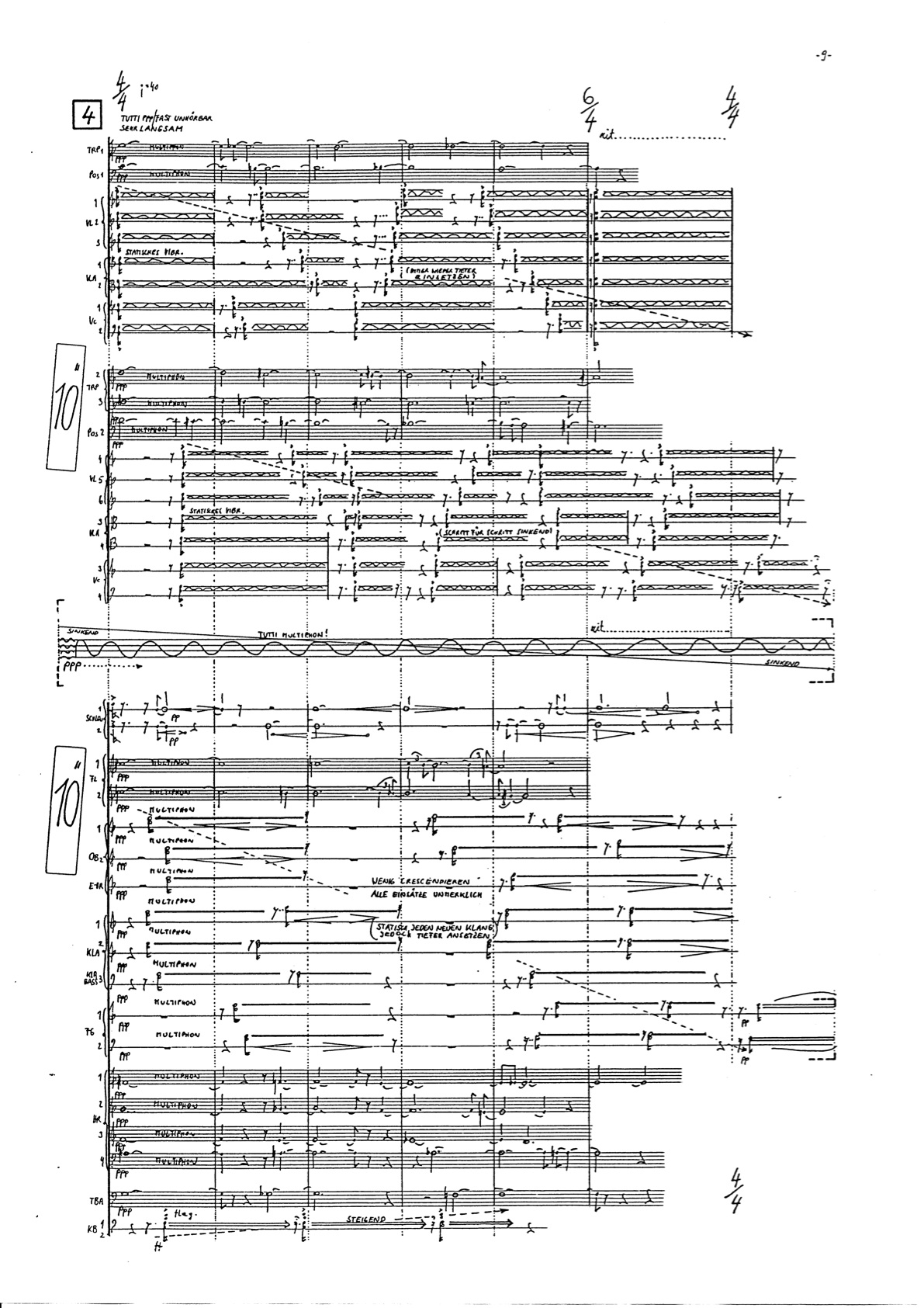 Noten zu Wolfgang Mitterers Werk Fisis. Sheet music of the work Fisis by Wolfgang Mitterer.